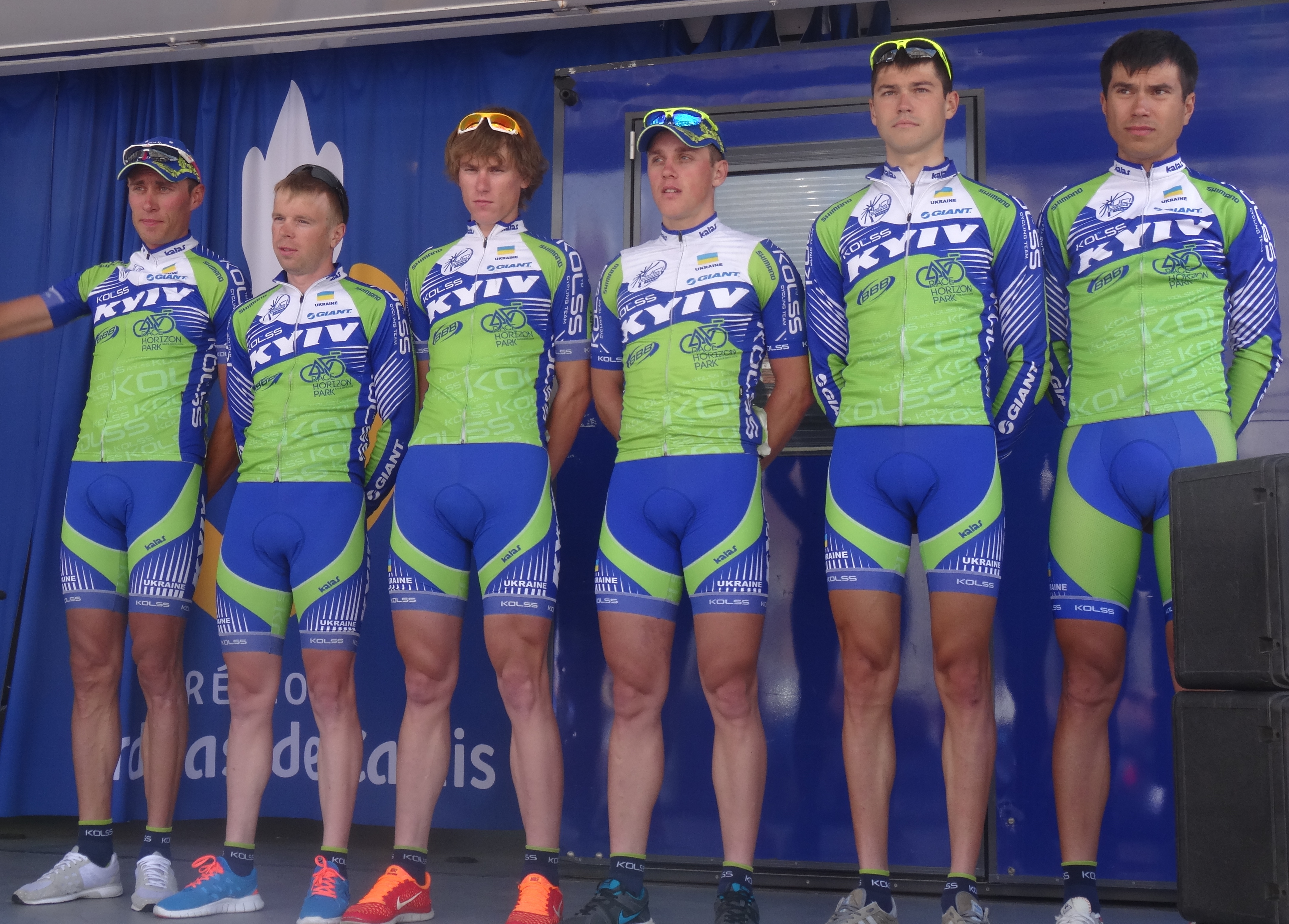 Reportage photographique réalisé le dimanche 25 mai 2014 à l'occasion du départ et de l'arrivée de la troisième étape du Paris-Arras Tour 2014 à Arras, Pas-de-Calais, Nord-Pas-de-Calais, France. Depicted people: Oleksandr Kvachuk, Oleksandr Prevar, Oleksandr Golovash, Andriy Kulyk, Andrii Bratashchuk and Oleksandr Polivoda Depicted team: Kolss